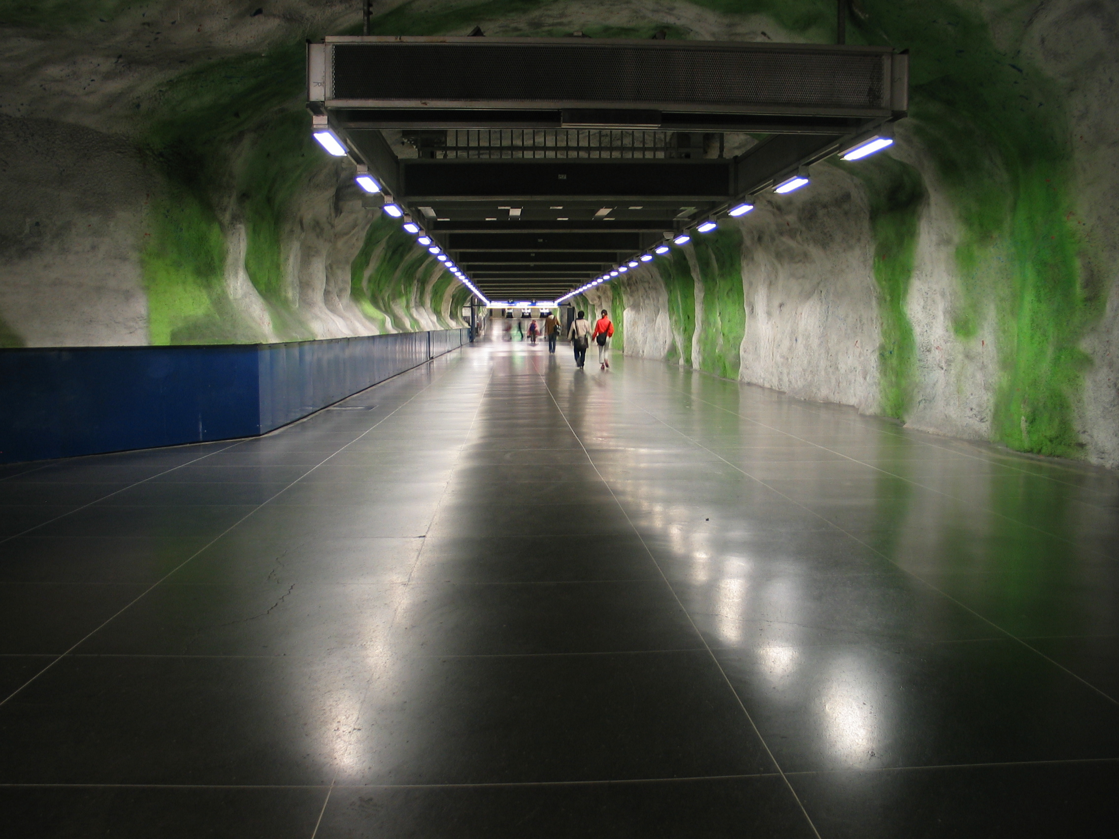 Fridhemsplan, a metro station in Stockholm, Sweden.